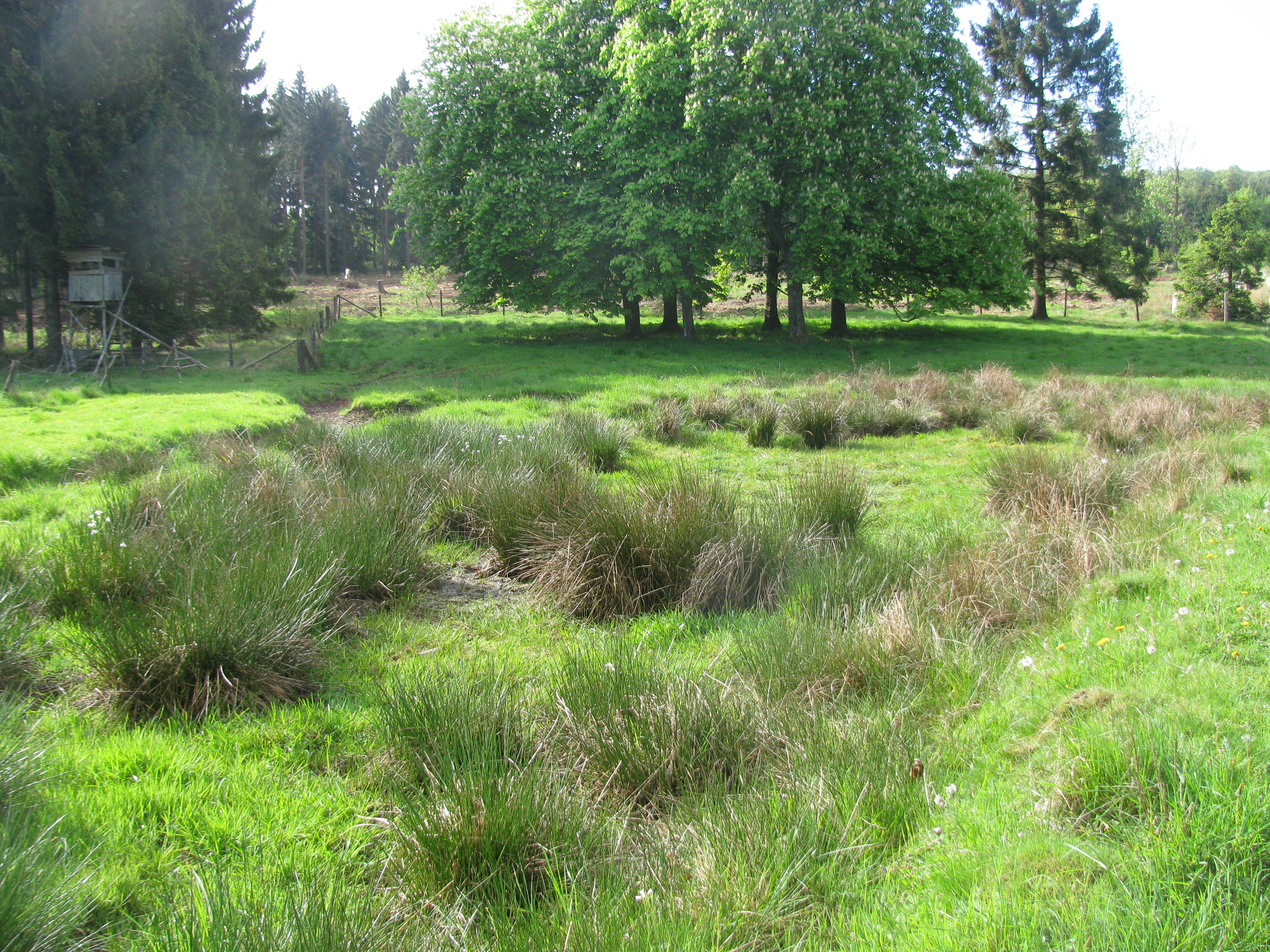 Teich und trockener Graben auf der Wiese der Ahne